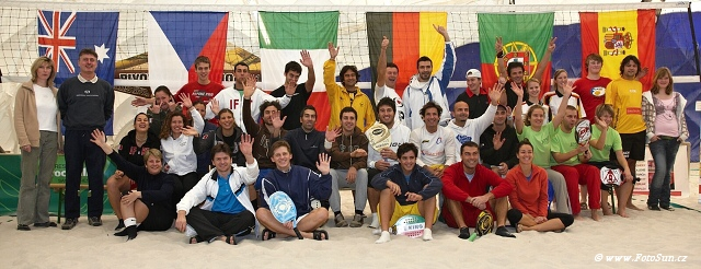 beachtenis mčr 2009